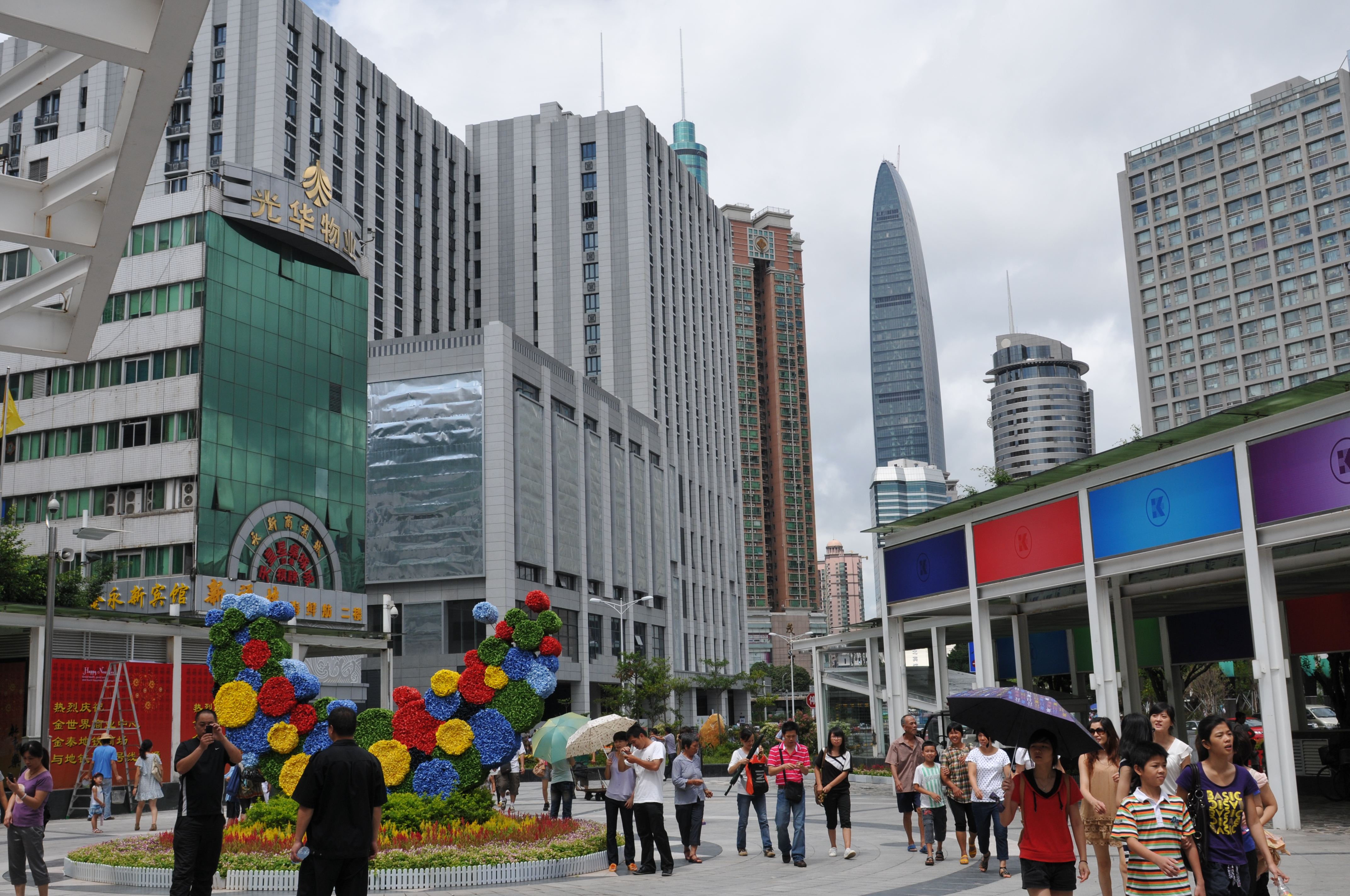 中国广东省深圳市罗湖区 China Luohu District, Shenzhen, Guangdong Province China Xinjiang Urumqi Welcome you to tour the, Китай Синьцзяна Урумчи приветствовать Вас на экскурсию, الصين ترحب زيارتك لاورومتشى فى شينجيانغ, 中国新疆のウルムチへの訪問を歓迎する, 中国新疆乌鲁木齐欢迎您来观光旅游